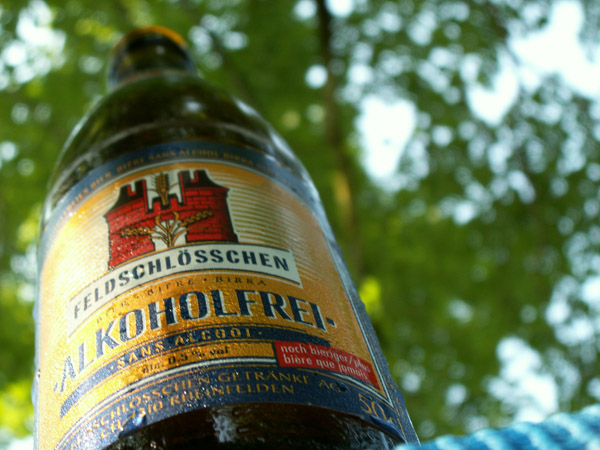 Bildbeschreibung: Aufnahme einer Flasche Feldschlösschen-Alkoholfrei, im Sommer 2005, in einem Restaurant am Klöntalersee Fotograf: Roman Schlegel (User:Success) Datum: 27.7.2005 andere Versionen: keine